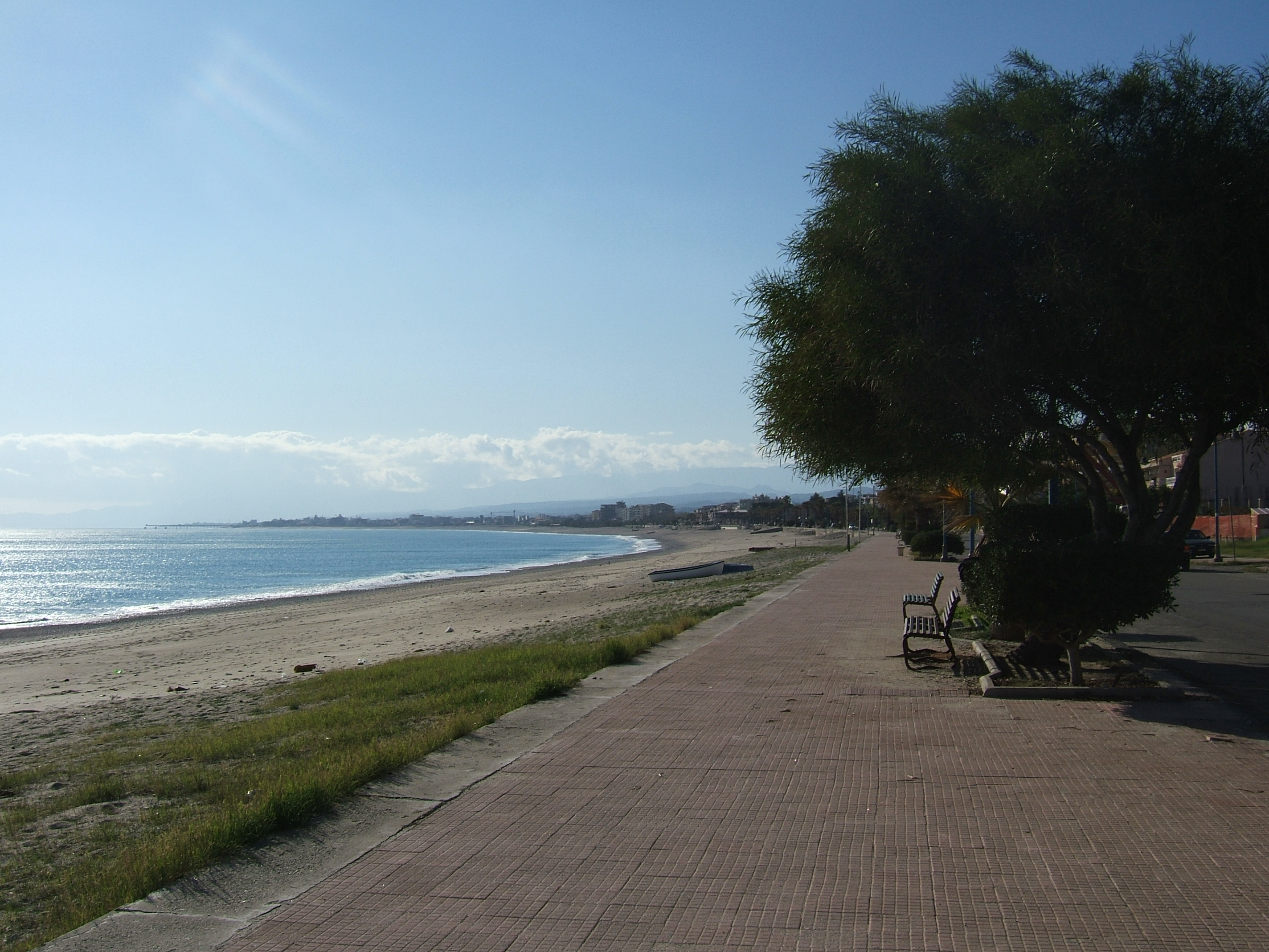 Spiaggia di Marina di Gioiosa Ionica (RC)